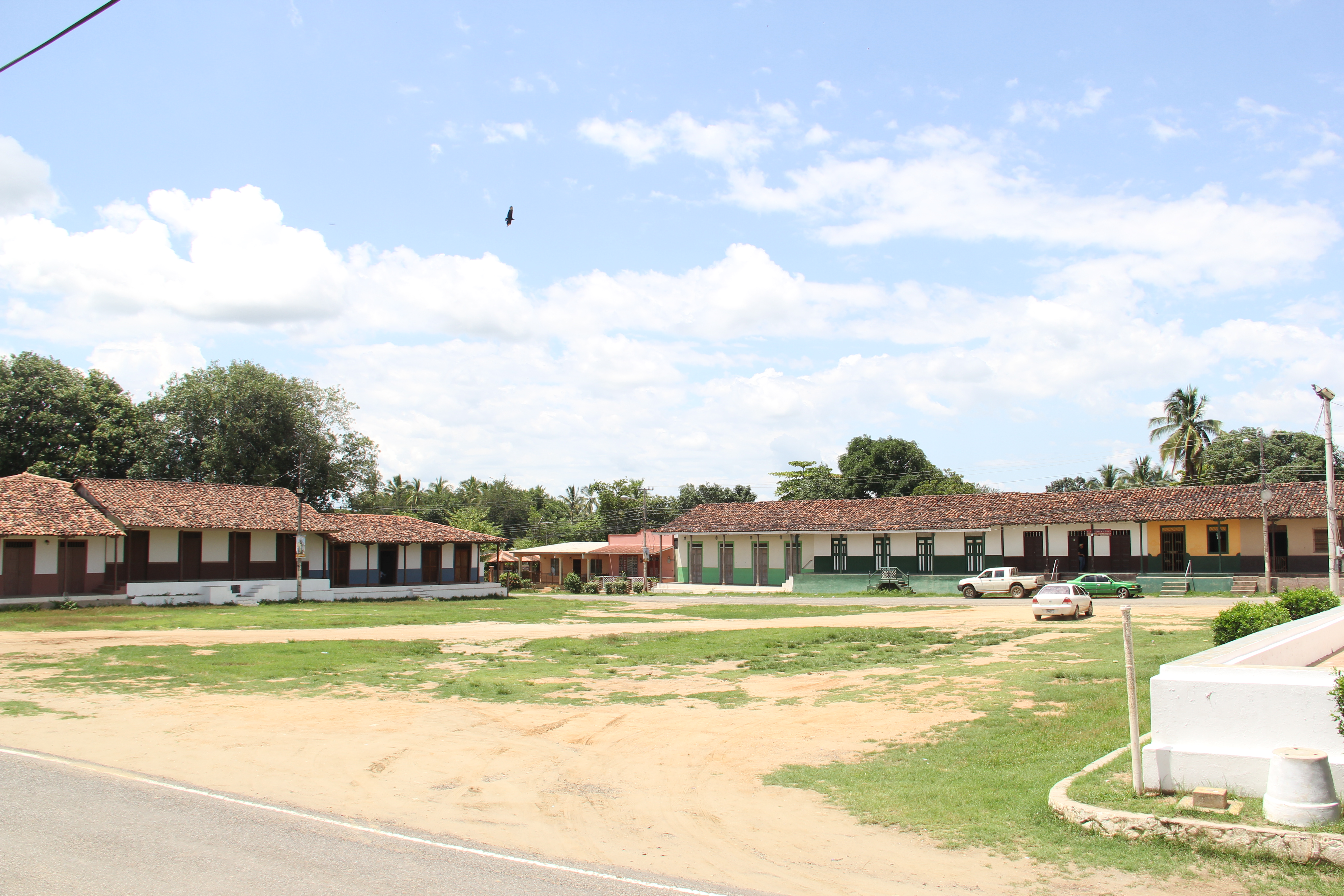 La plaza colonial de Parita es una de las pocas que queda con la característica de los tiempos del imperio español en América, y los pariteños celebran estas festividades con gran colorido y entusiasmo. Según la historia, en sus inicios la plaza era utilizada para la venta y comercialización de indios y posteriormente para la venta de esclavos negros y la compra de productos y animales. Con días de antelación a las festividades de Santo Domingo de Guzmán los pariteños y vecinos, ayudan a arreglar la Plaza Colonial para los tres días de fiesta de toros, con ganados traídos de la montaña. La corrida de toro no necesita arreglarse, puesto que las casas que se encuentran a su alrededor, formando un círculo, sirven para rodearla. El sitio tiene la particularidad, de que no hace falta construir una barrer, puesto que los portales sirven como ruedo. El área tiene la capacidad para más de 20 mil espectadores en una tarde de toros y sólo se permite jugar ganado de un peso de mil a 1,200 libras de peso. La Plaza Colonial data del siglo XVI y en la actualidad es utilizada para conmemorar los actos más importantes de los residentes en el distrito.